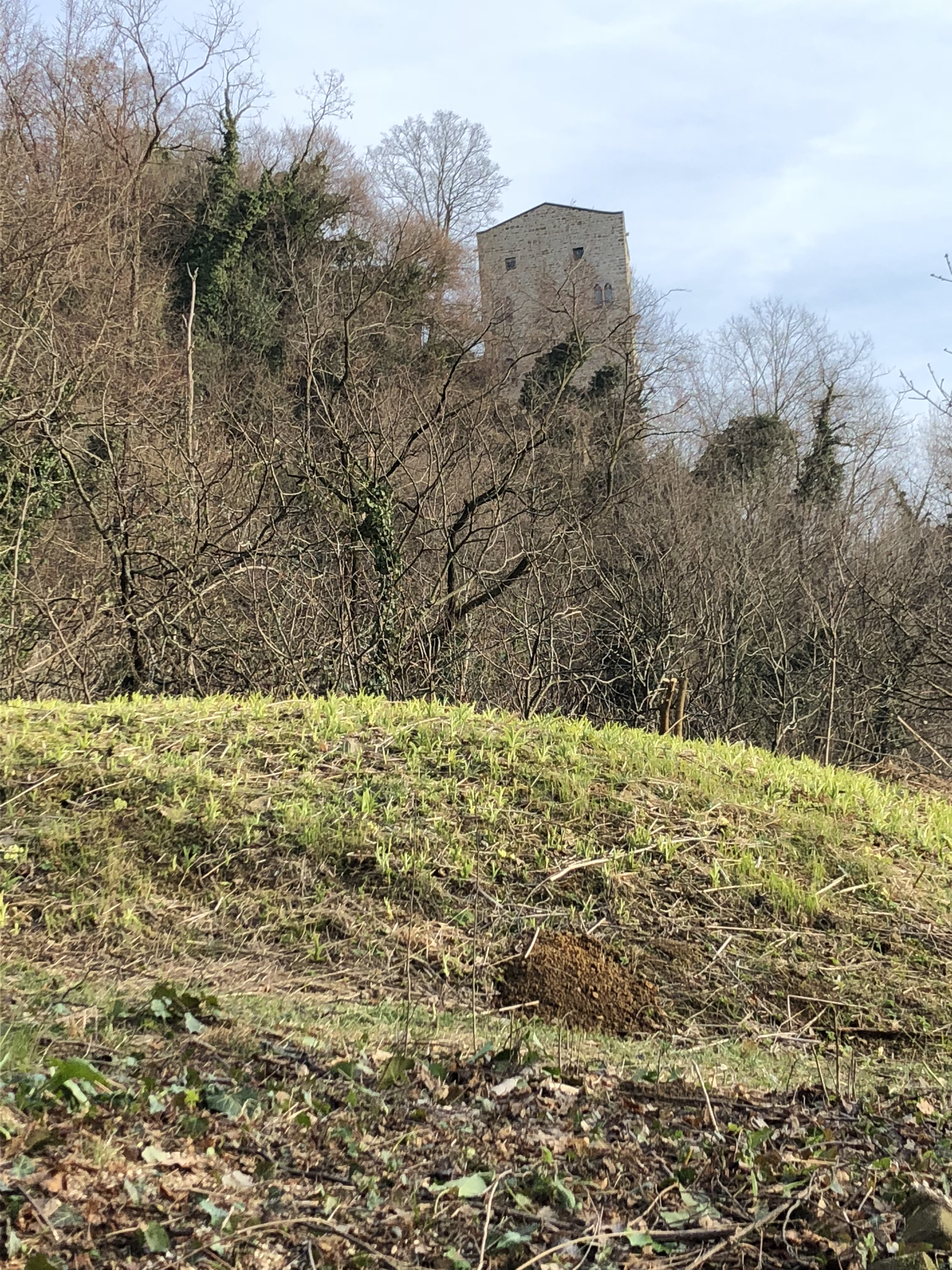 Castello Partistagno